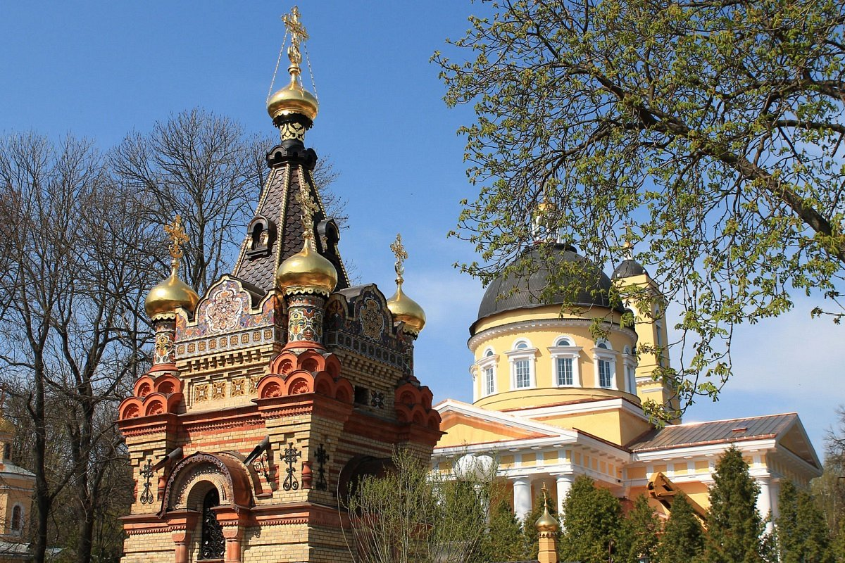 Палацава-паркавы комплекс ў Гомелі. Сабор і капліца